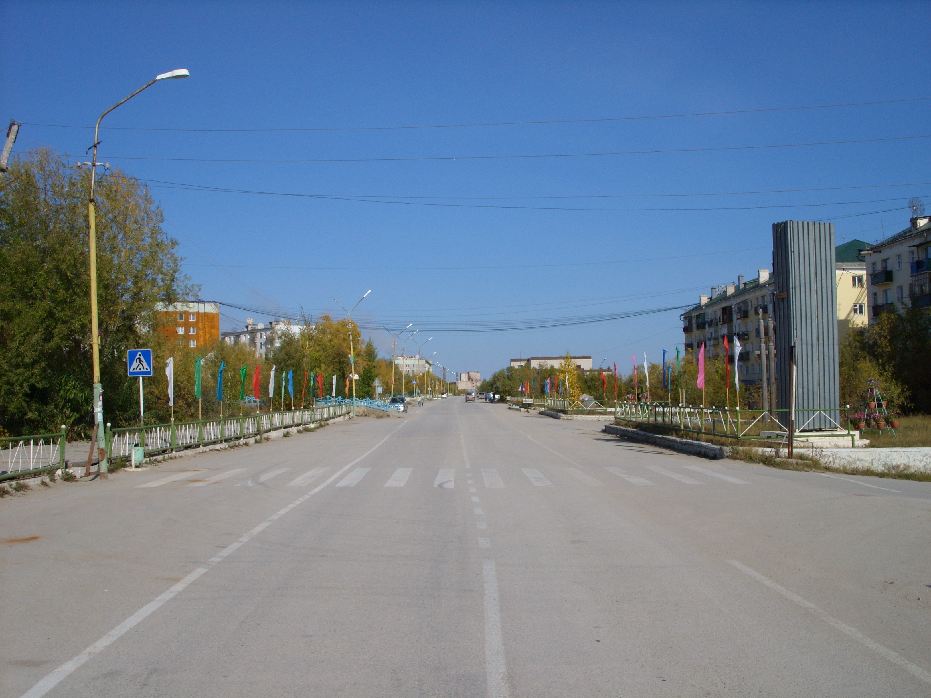 ул. Заводская